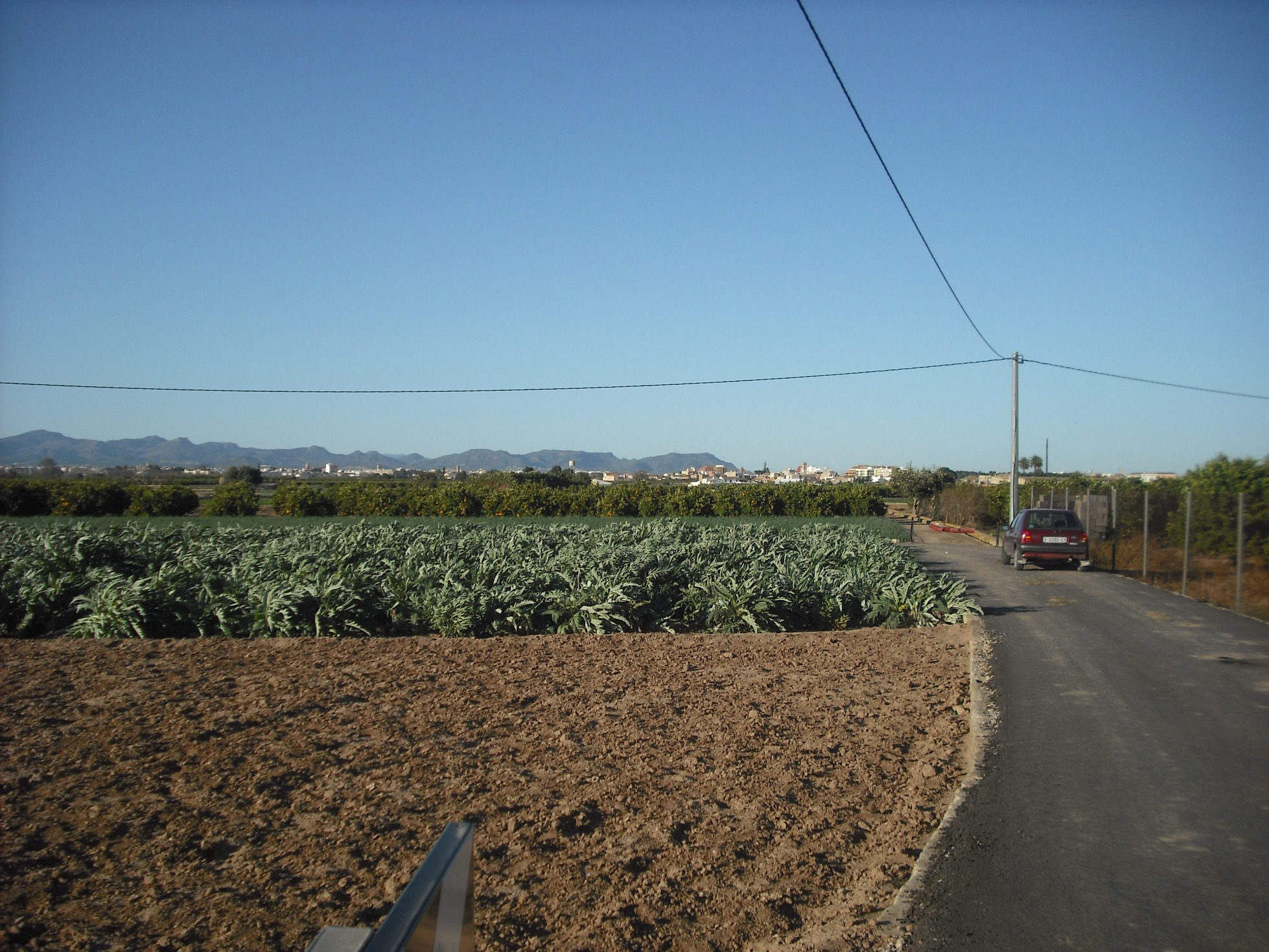 Horta a prop de Borbotó. Al fons es pot distinguir Benifaraig.